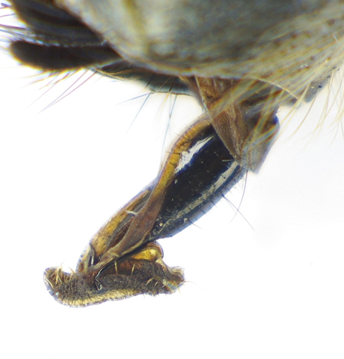 Rüssel einer Schmeißfliege